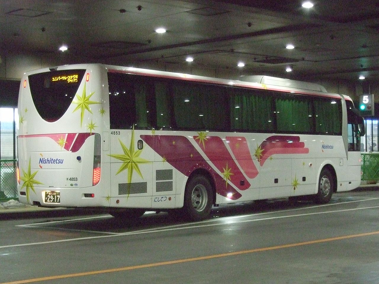 Nishitetsu express bus for Universal Studio Japan. 福岡 - ユニバーサル・スタジオ・ジャパン間夜行高速バス